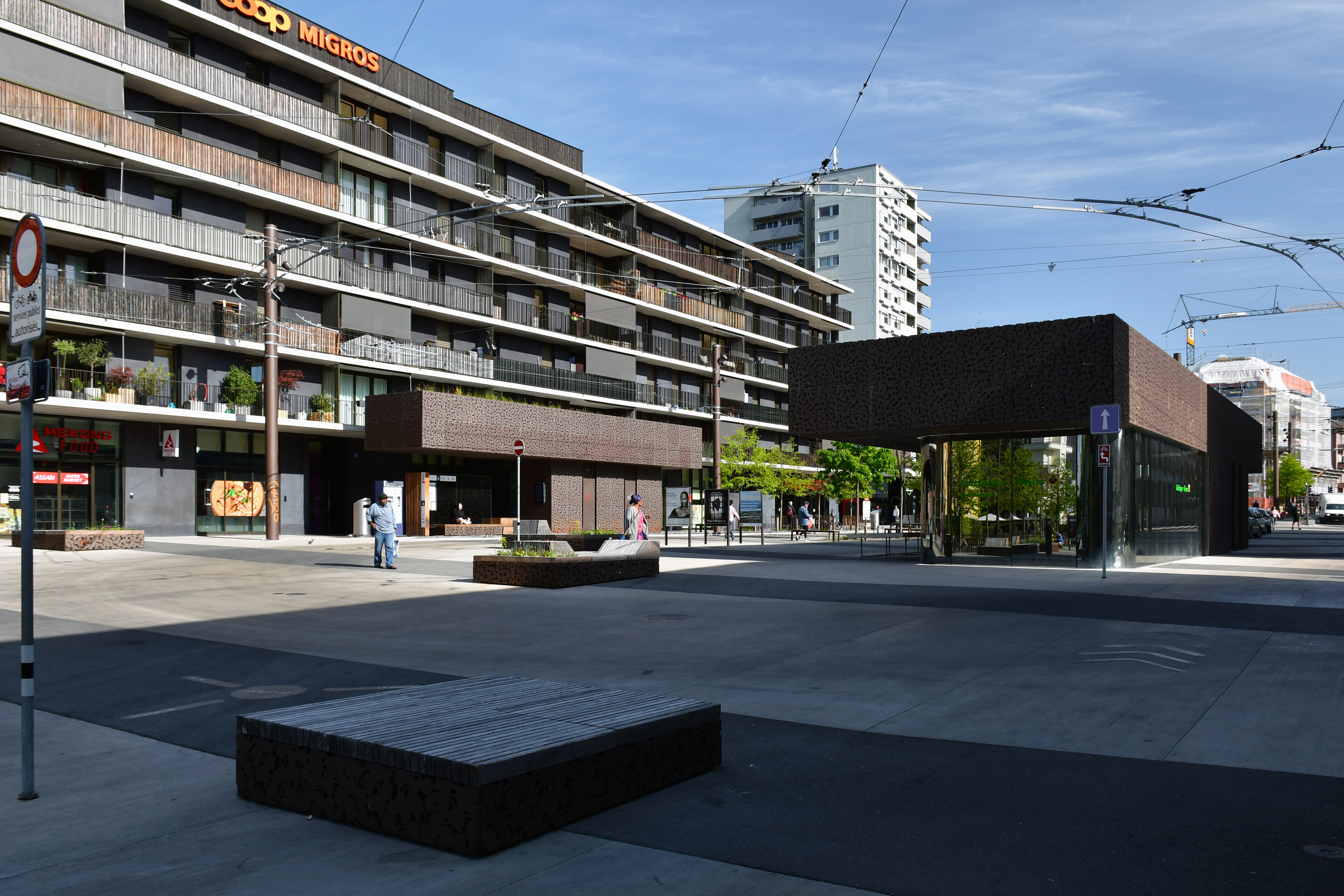 La place de la Sallaz de Lausanne (Suisse).